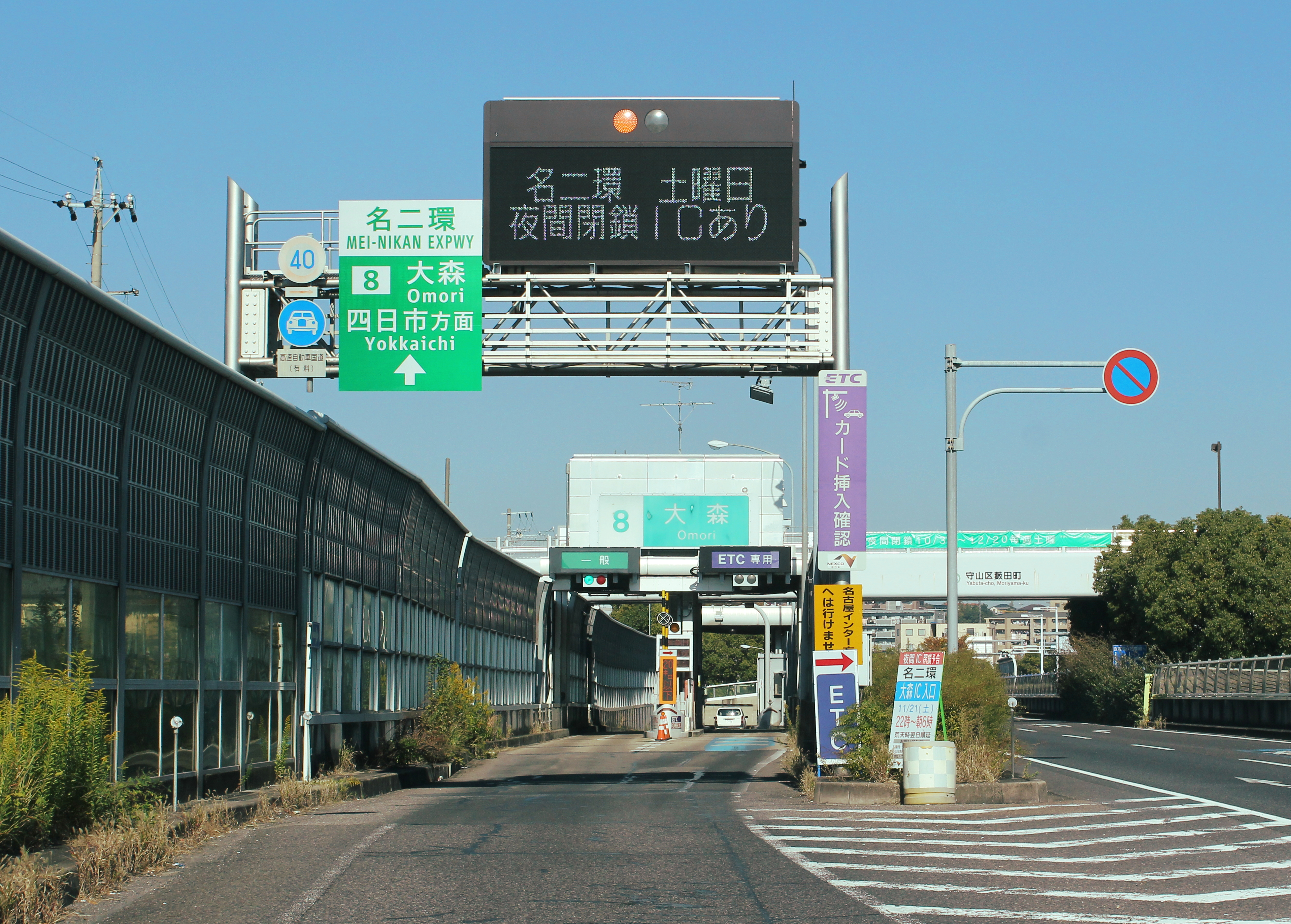 名二環 大森IC